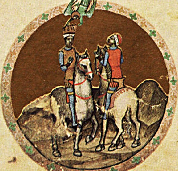 Géza I of Hungary and Ladislaus I of Hungary